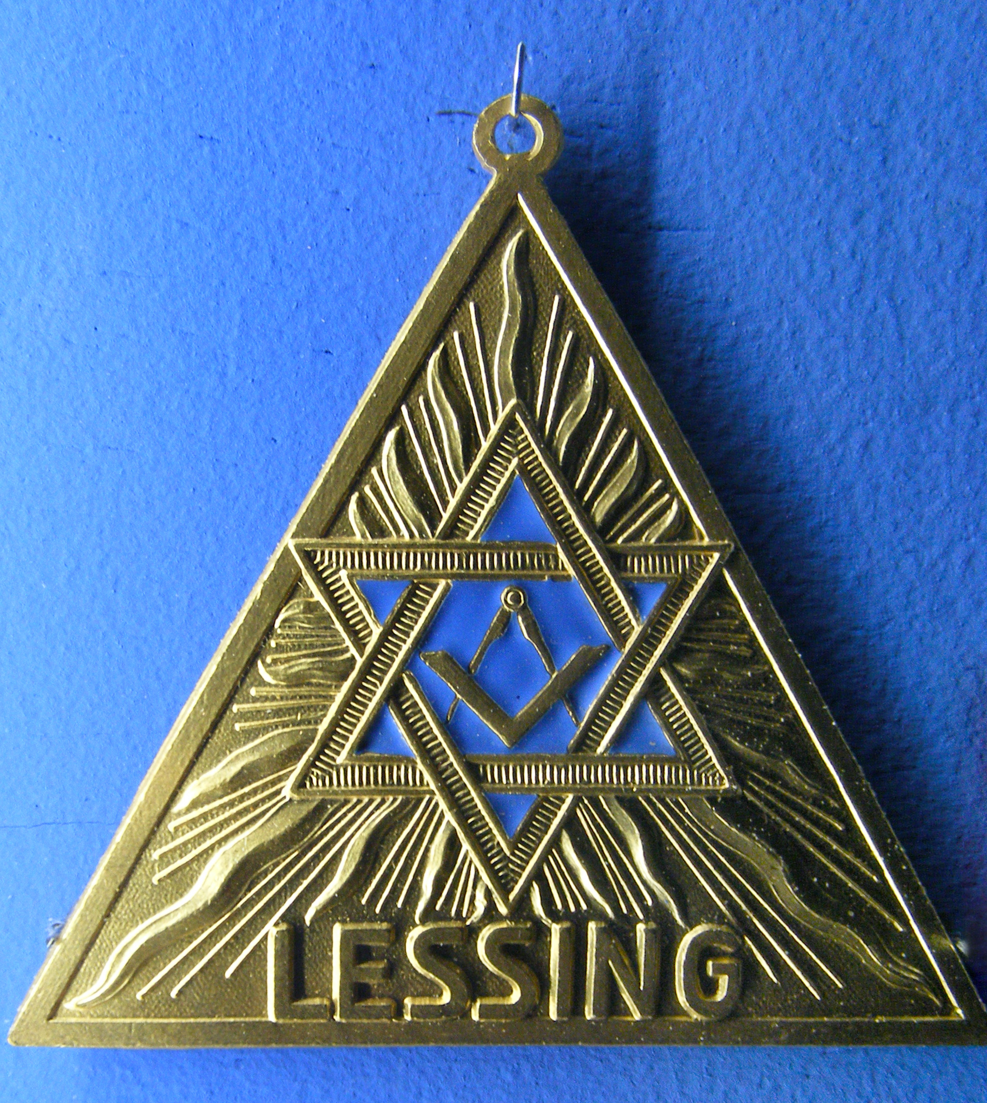 Bayreuth, Deutsches Freimaurermuseum — Bijou der Loge Lessing zum flammenden Stern, München